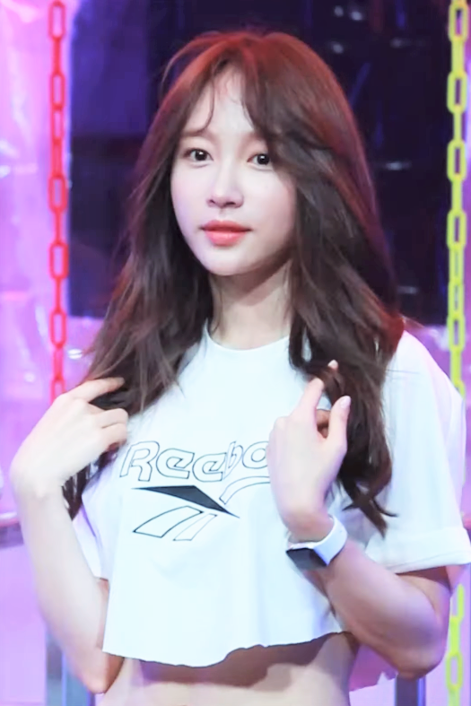 190614 리와인드 리복 포워드 전시 이벤트